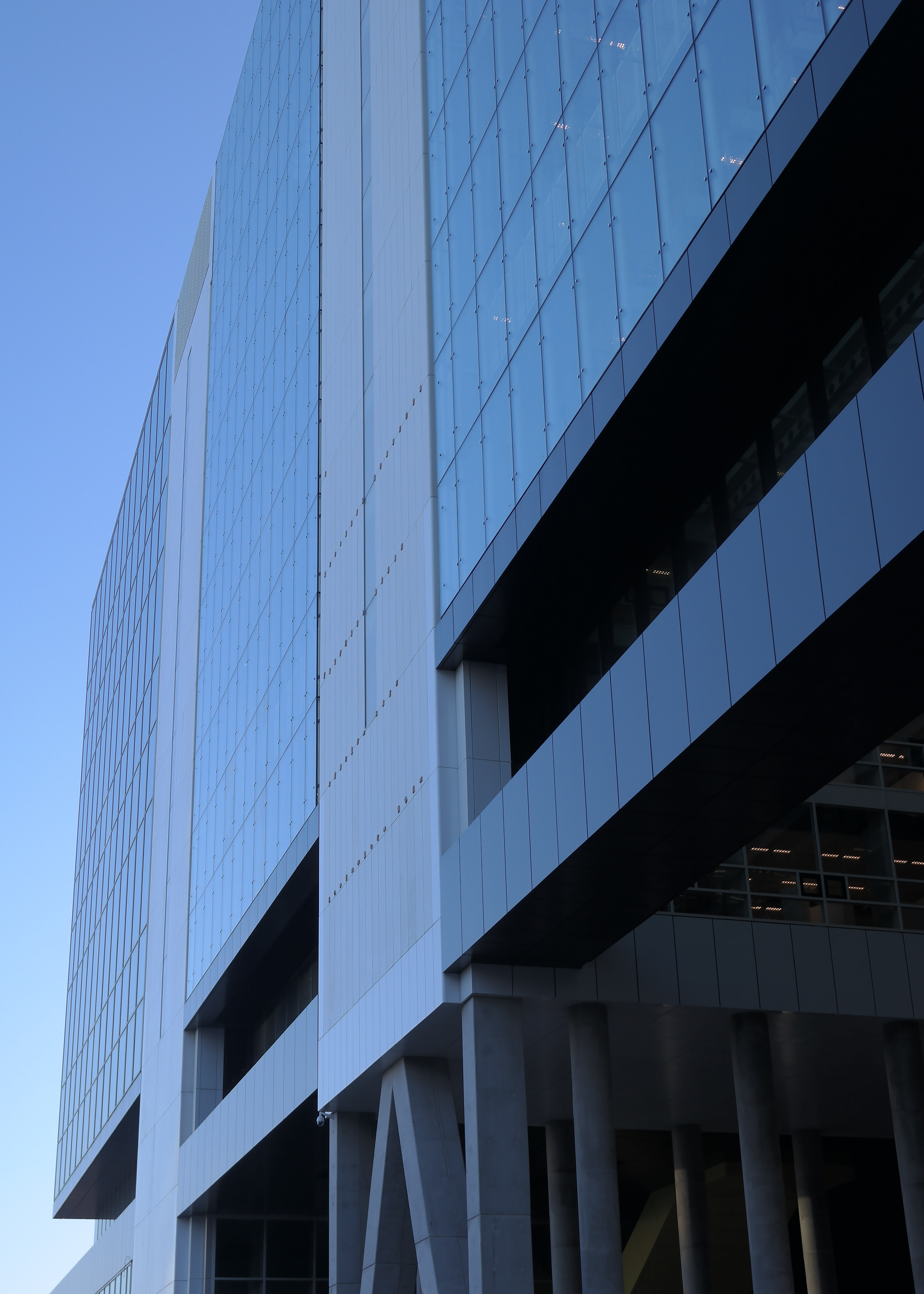 Het voormalige VROM-gebouw in Den Haag, januari 2017.